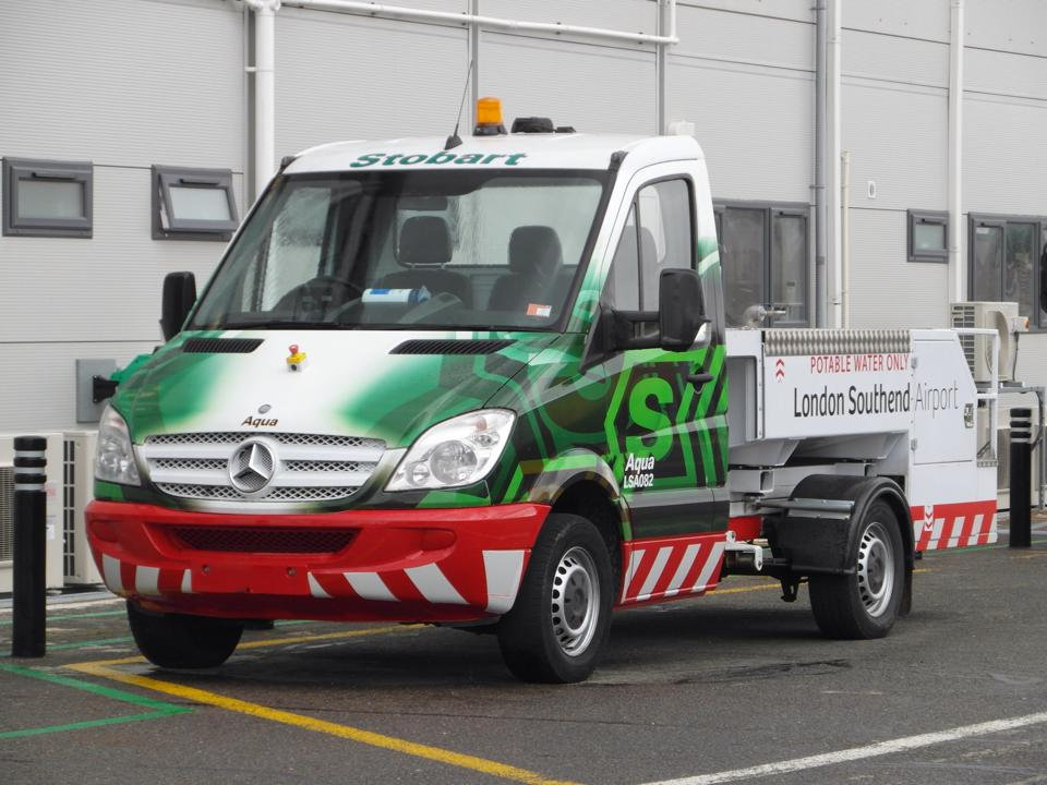 stobart merc van